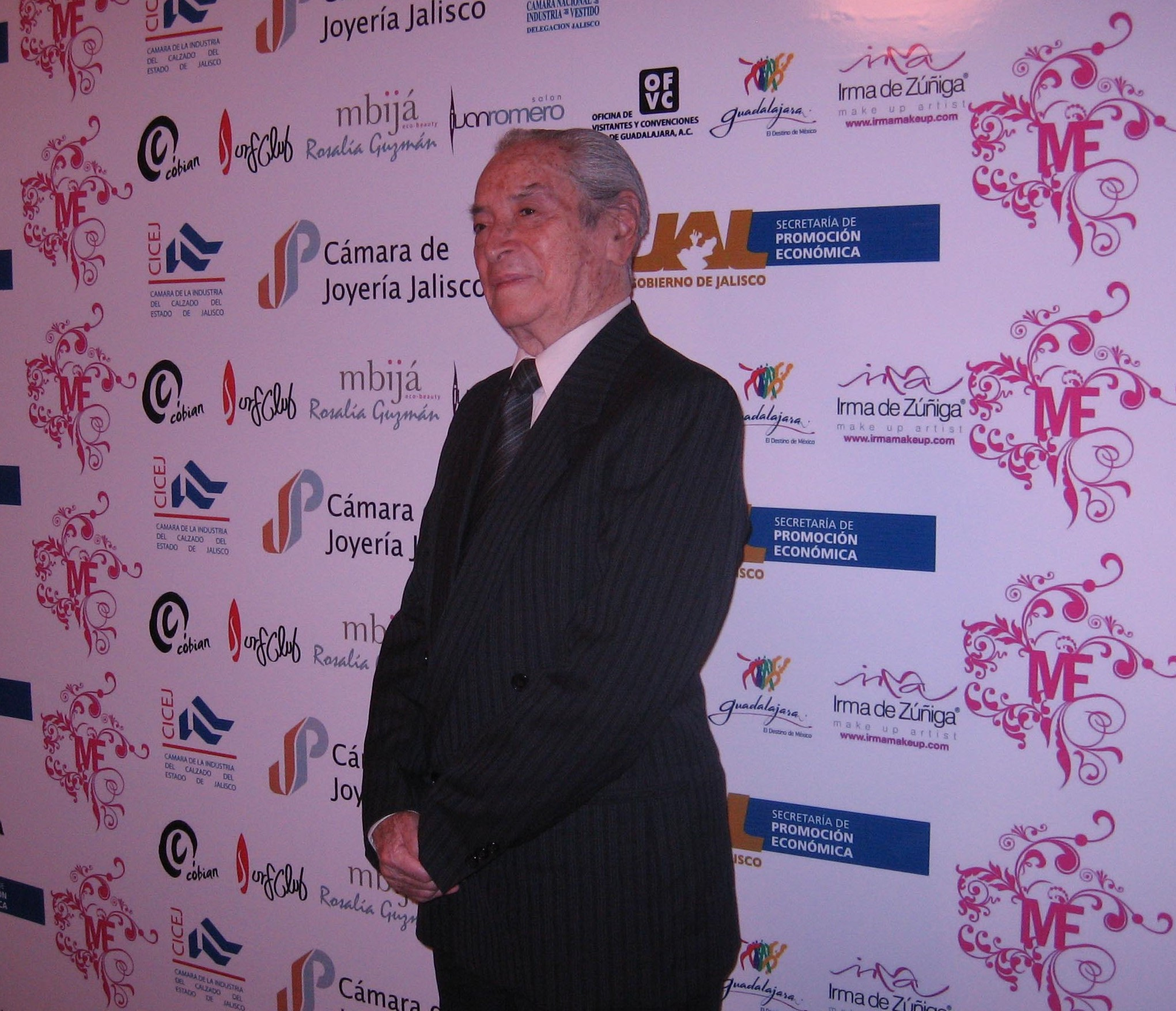 Ramón Valdiosera en Minerva Fashion durante la entrega del galardón Minerva como la personalidad más importante de la moda en México.